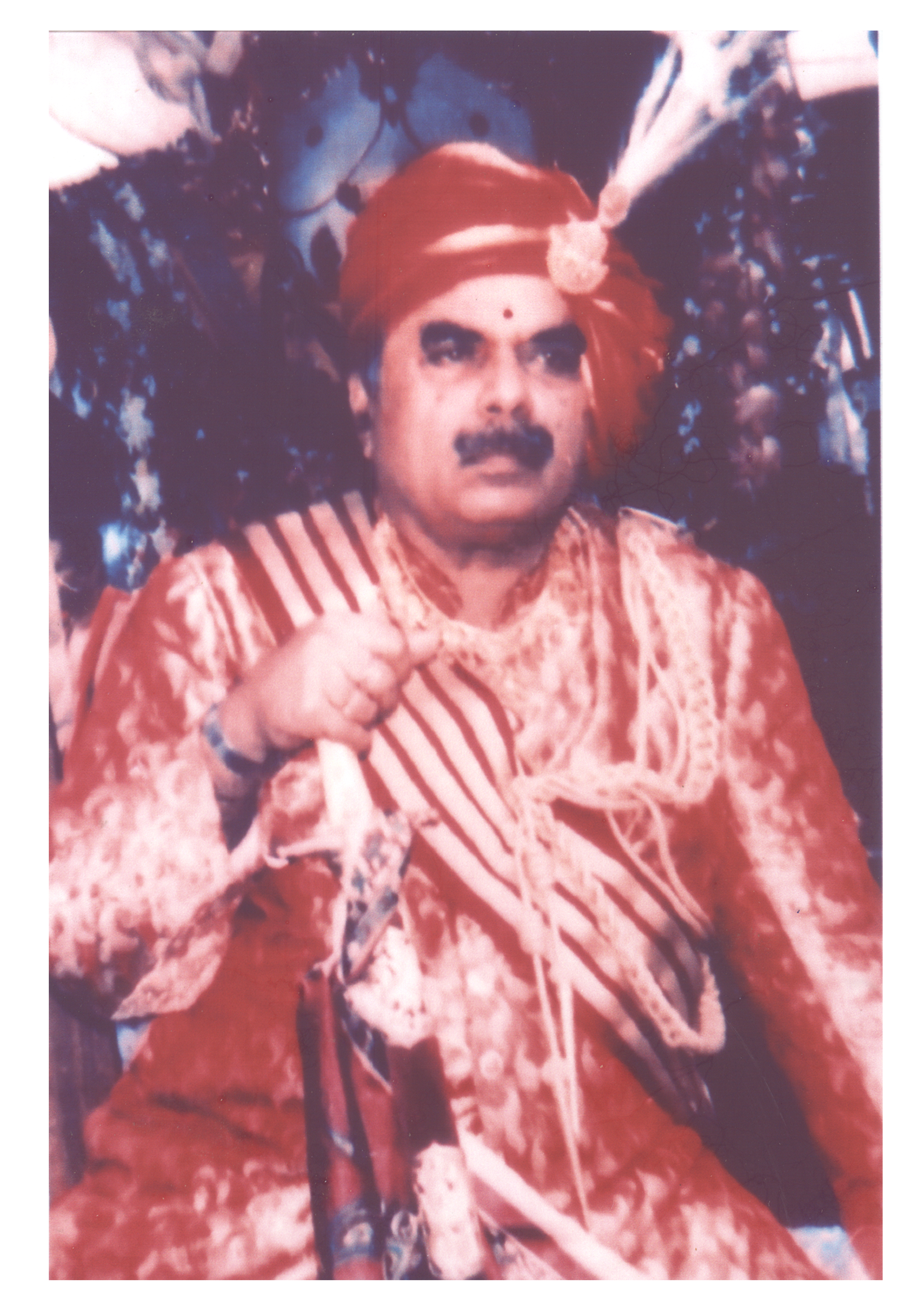 Dharakote king